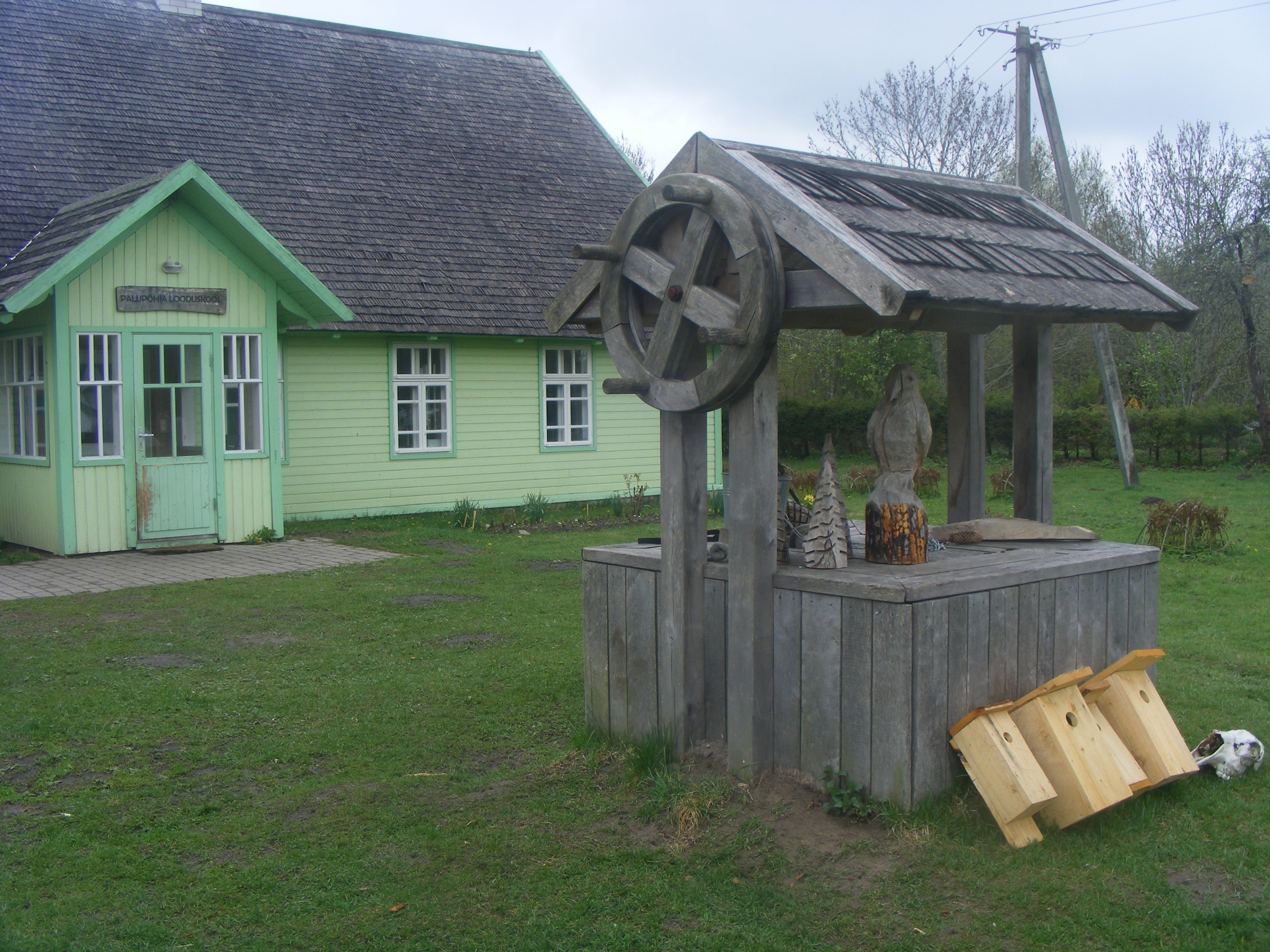 Koolilapsed on pesakaste meisterdanud. Emajõe kaldal, Palupõhjas on ka ööbimiskoht paarikümnele loodushuvilisele õpilasele.